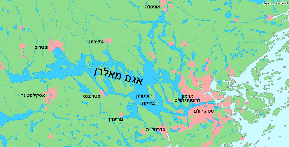 אגם מאלרן